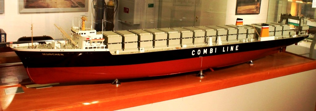 Modell der München im DSM